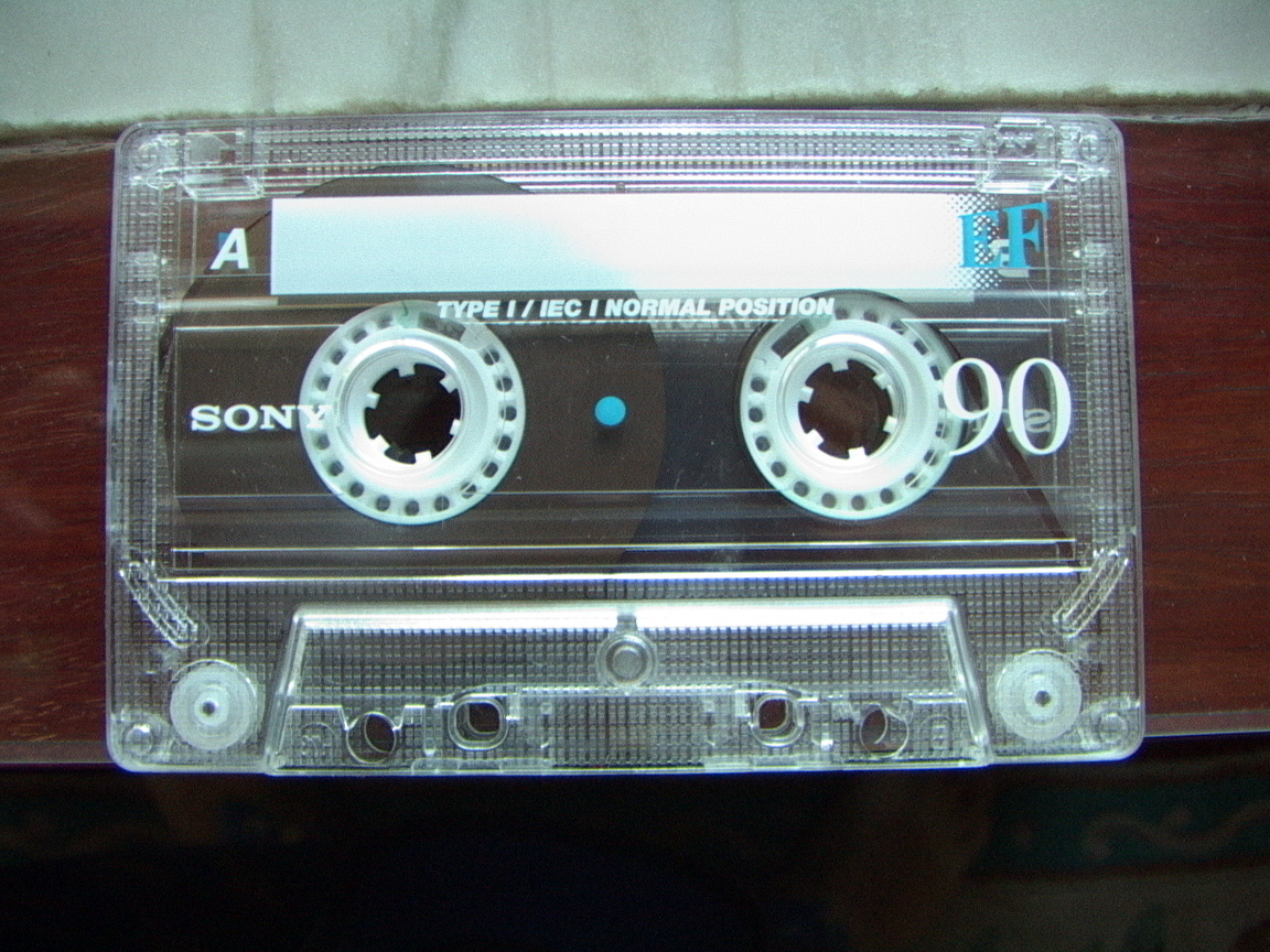 user:coolgene拍摄的Compact audio cassette。